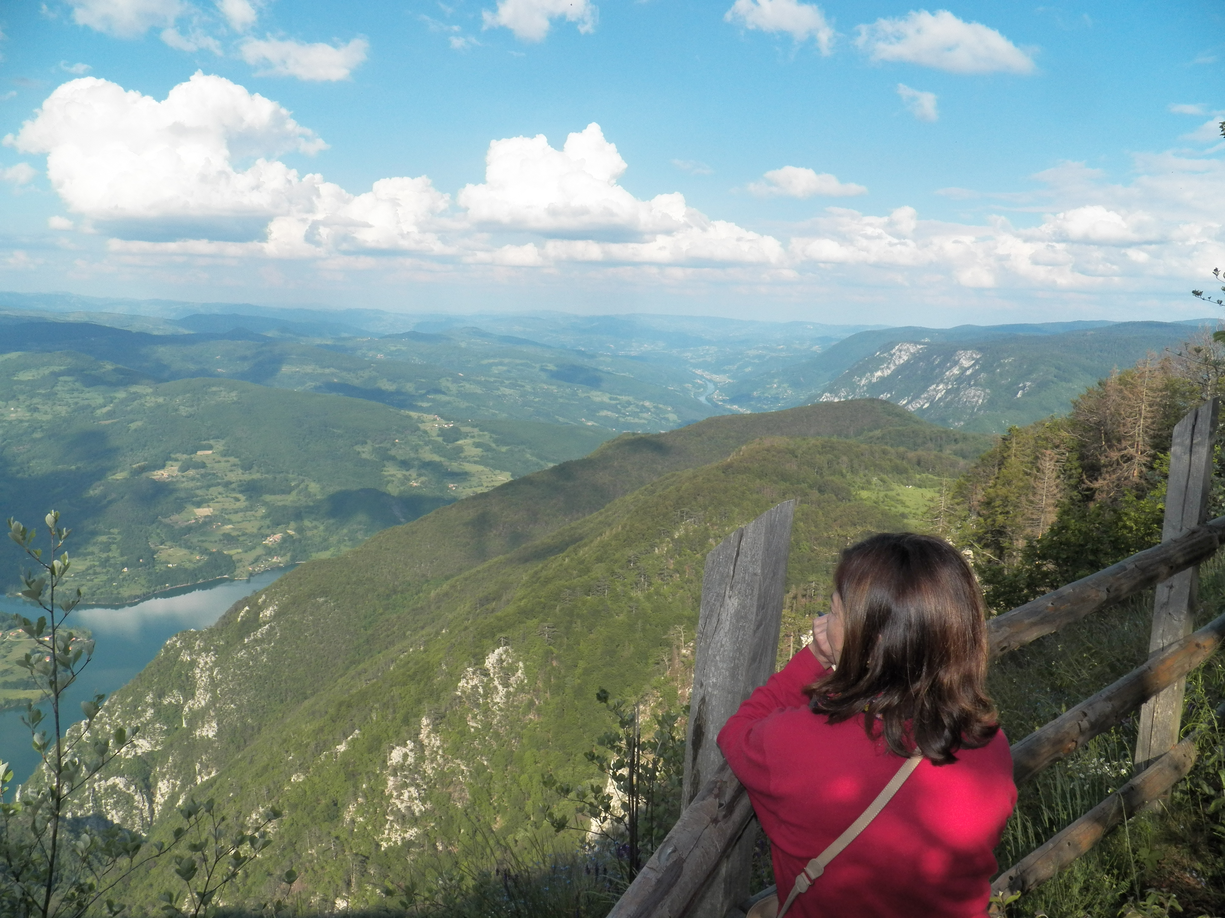 Српски (ћирилица): Видиковца Биљешка стена , национални парк Тара Ово је фотографија заштићеног природног добра у Србији под шифром: НП03This is a a photo of a natural area in Serbia with ID: НП03